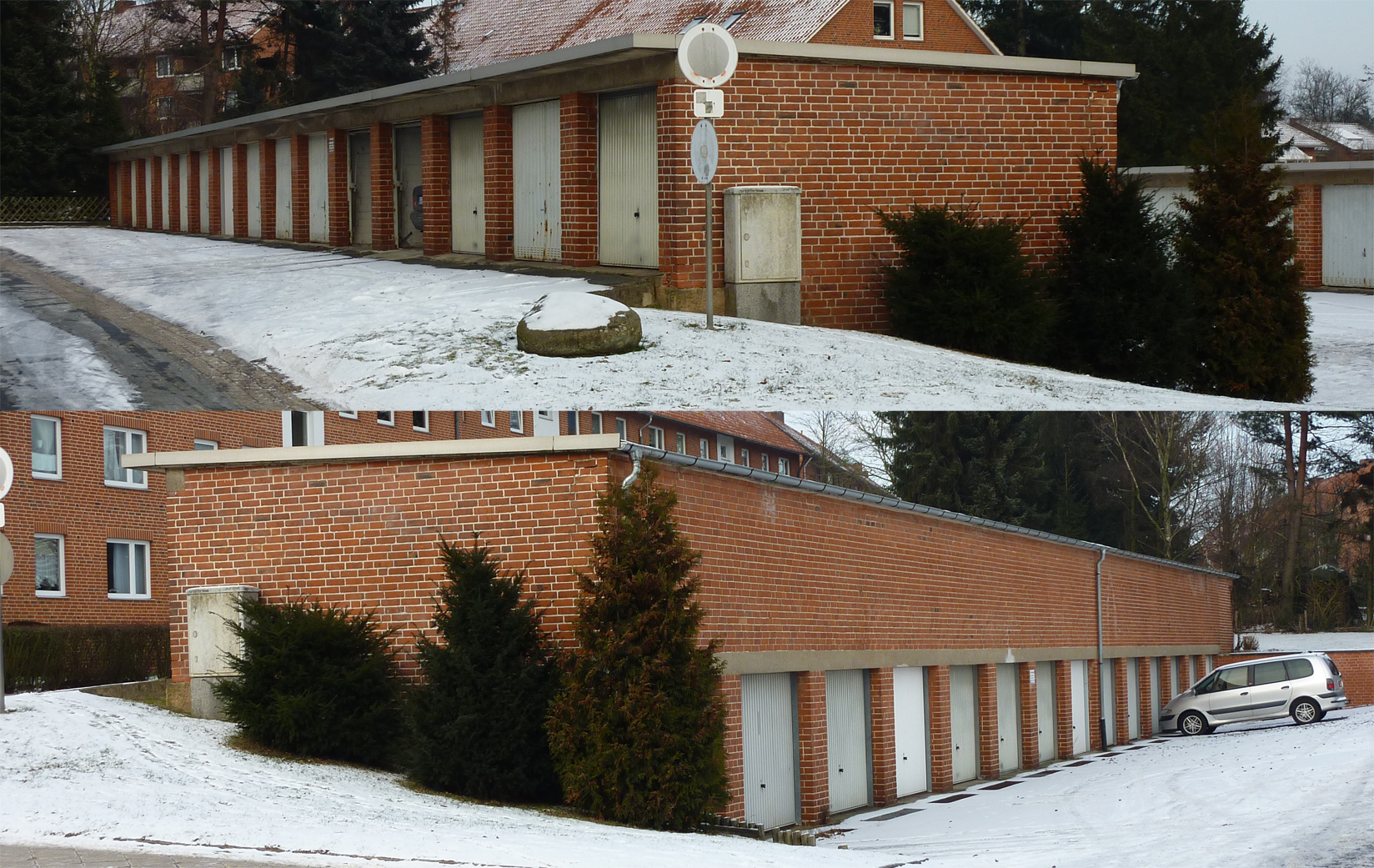 Eine Garage mit zwei Etagen an einer hügeligen Straße